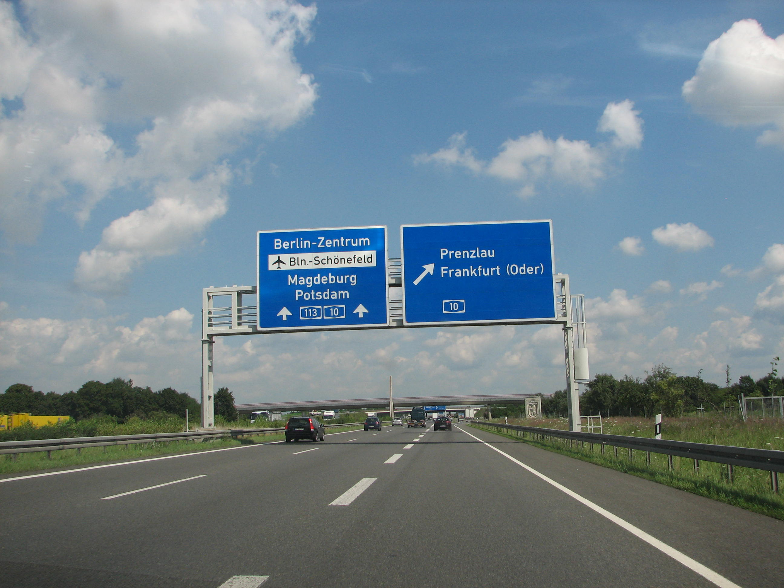 Hinweisschild am Schönefelder Kreuz